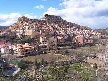 Vista parcial de la vila d'Ademús i la vall del Túria